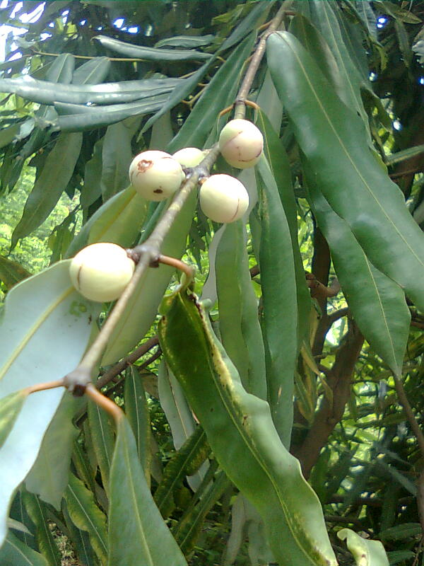 നാഗപ്പൂവു്